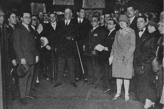 Foto de algunas personas en la primera feria del libro en el teatro Cervantes de la Ciudad de Buenos Aires, allí se los puede distinguir al presidente Alvear con sus ministros Roberto Ortiz y José Tamborini, recorriendo en el día de la inauguración.